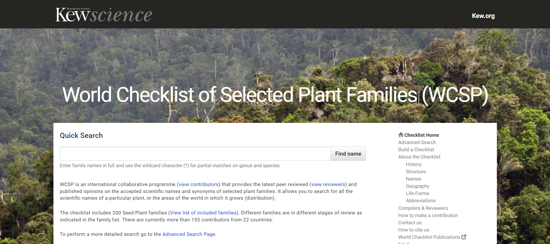 Copie d’écran du site KEW permettant la recherche d’éléments botanique.